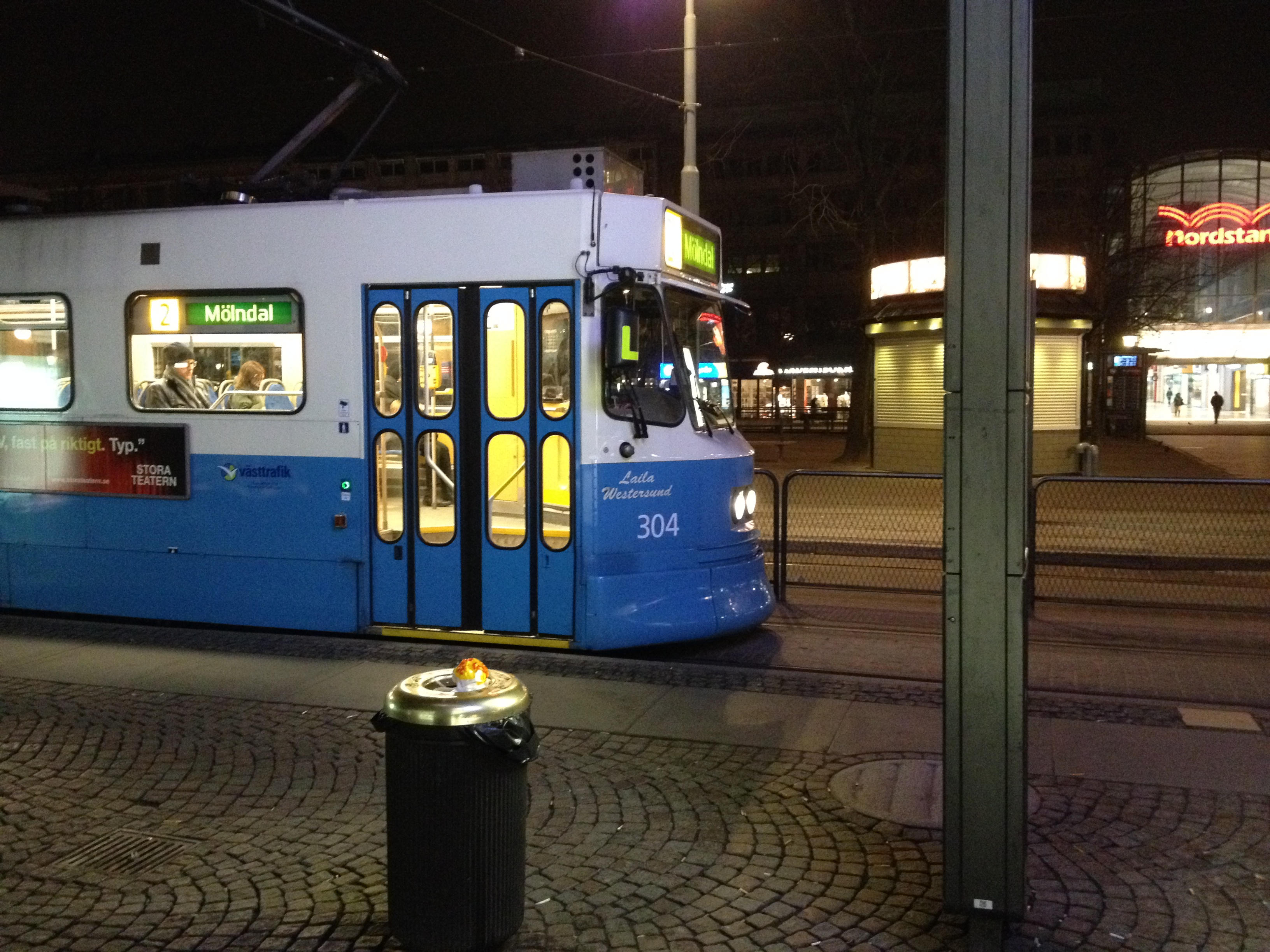 Linje 2 vid Brunnsparken Alias Laila Westersund